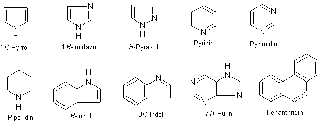 Heterocykly dusíku